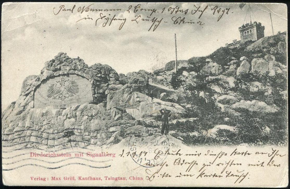 Diederichsstein Tsingtau